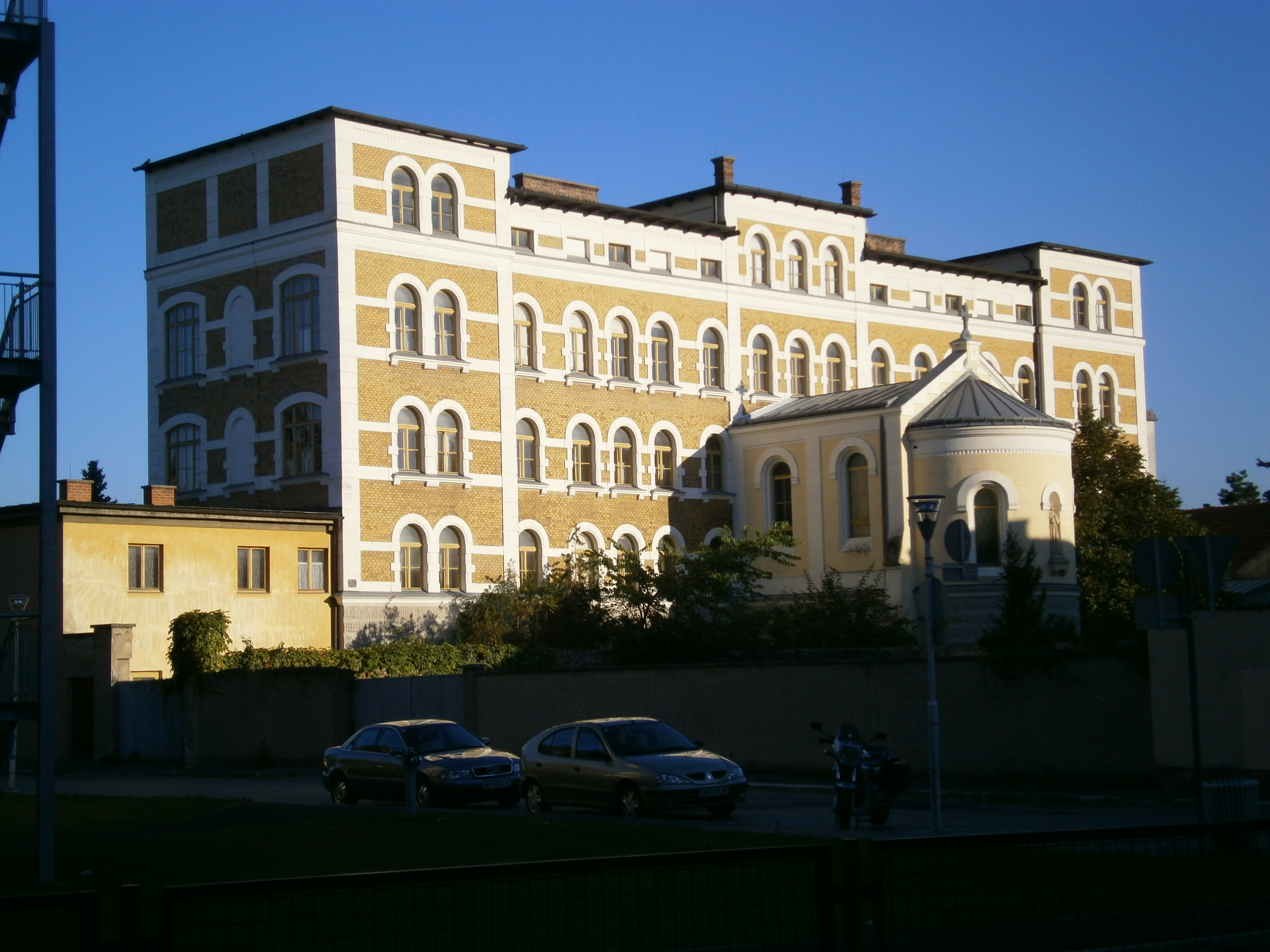 Marienheim, Waisenhausgasse 7, Wiener Neustadt